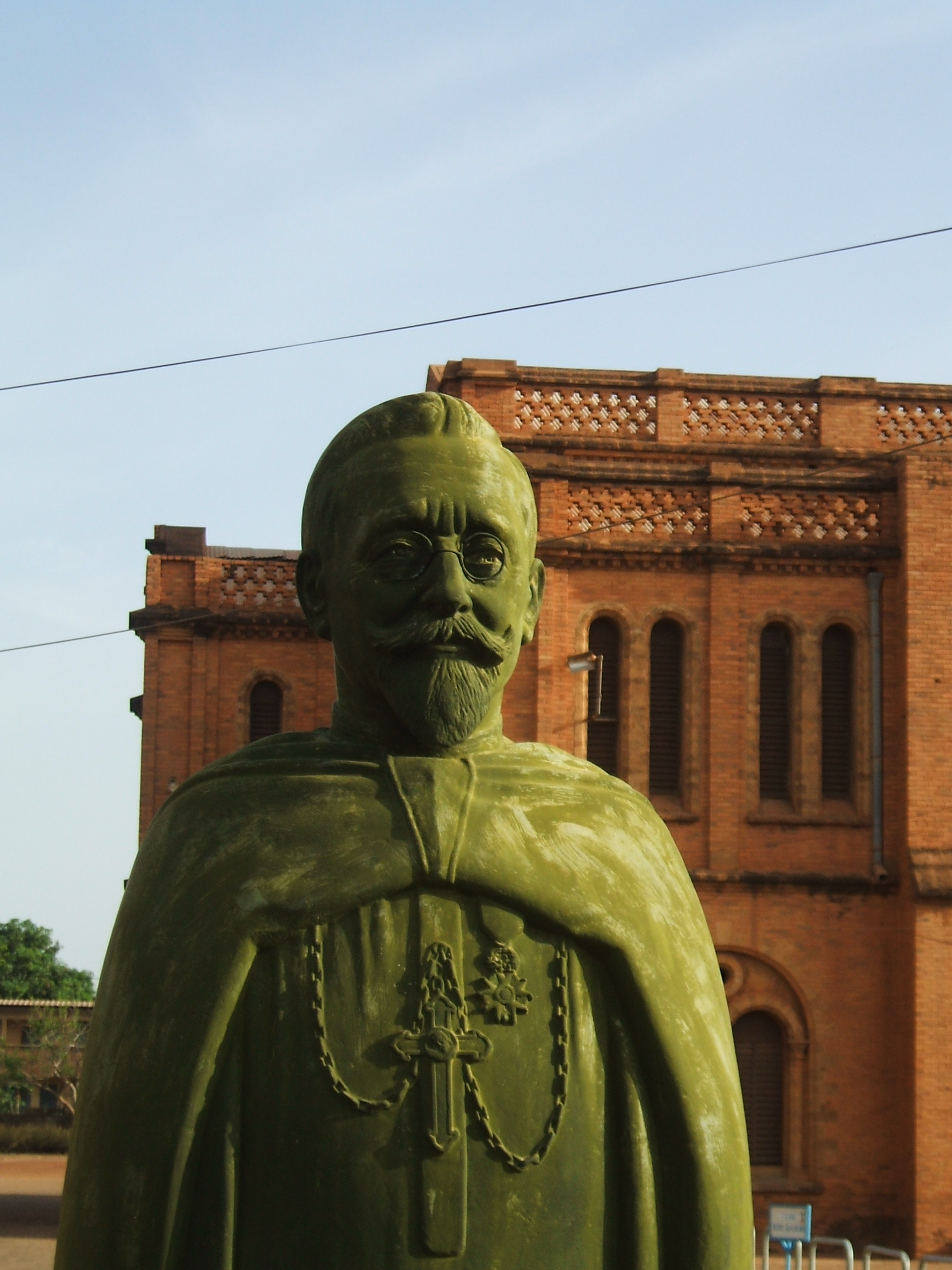 Buste de Mgr Thévenoud, premier ordinaire du vicariat apostolique de Ouagadougou, devant la cathédrale de Ouagadougou, Burkina Faso.